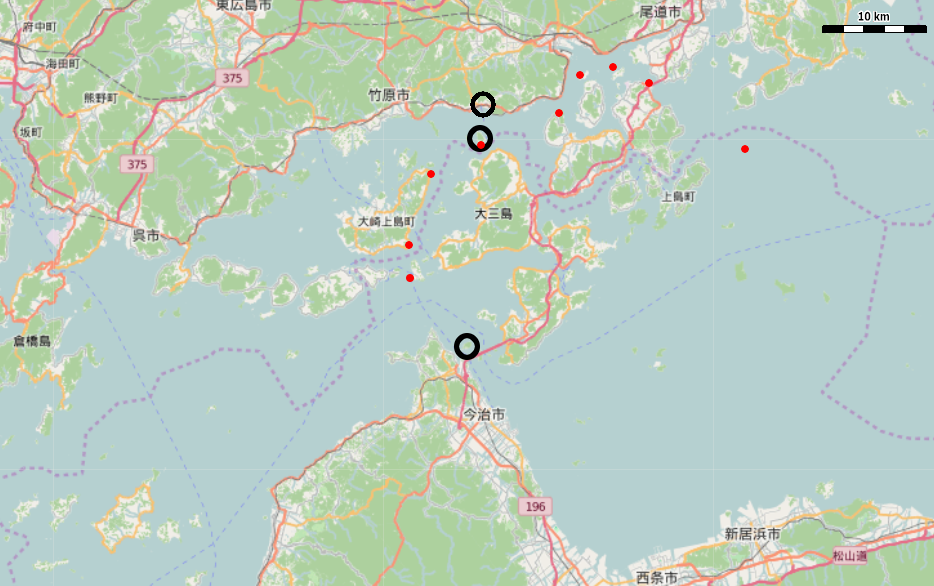 瀬戸内海芸予諸島周辺の三原瀬戸航路の灯台と芸予要塞の位置図 This map may be incomplete, and may contain errors. Don't rely solely on it for navigation.